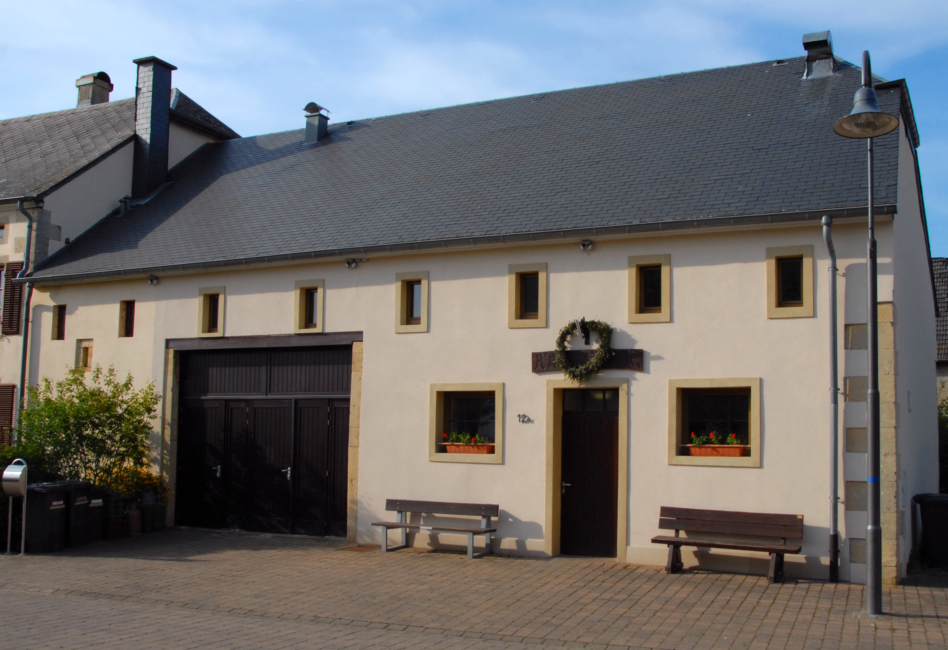 "A Millesch" zu Lampech.